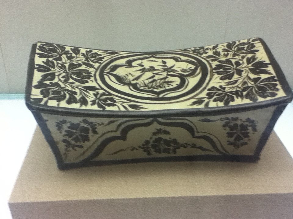 中文（香港）: 白瓷黑花開光蘆鳥紋方枕，金大定二十三年（1183），藏於山西省博物院